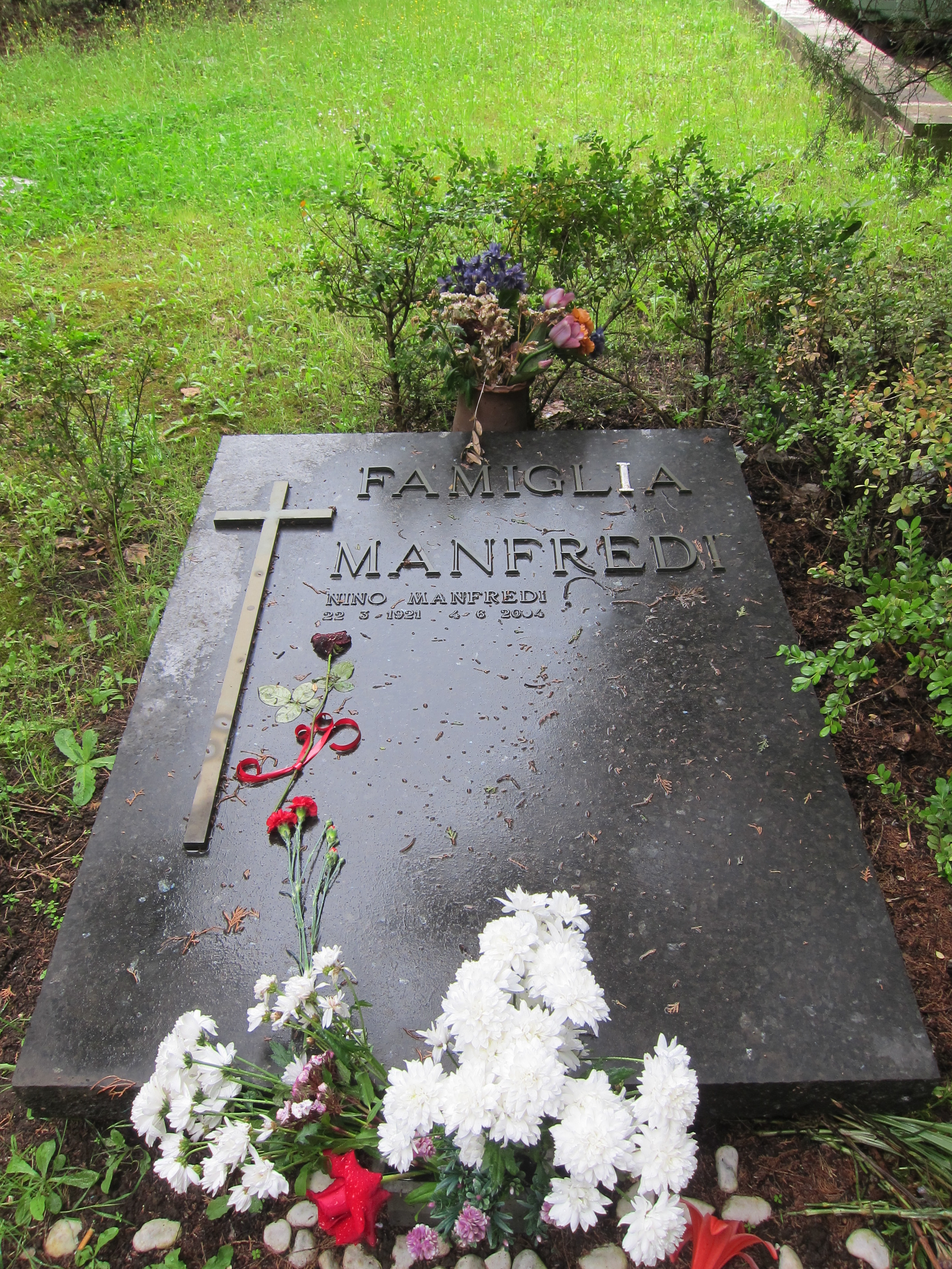 Tombe de Nino Manfredi au cimetière communal monumental de Campo Verano à Rome.